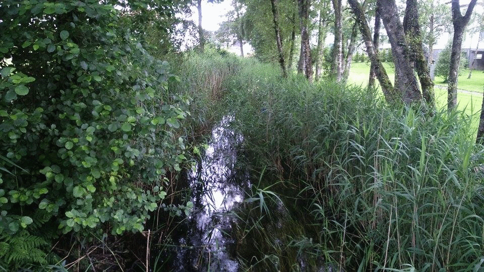 Brynebekken sett fra en av gangbroene i Selvaagparken på Bryne i Vanse.